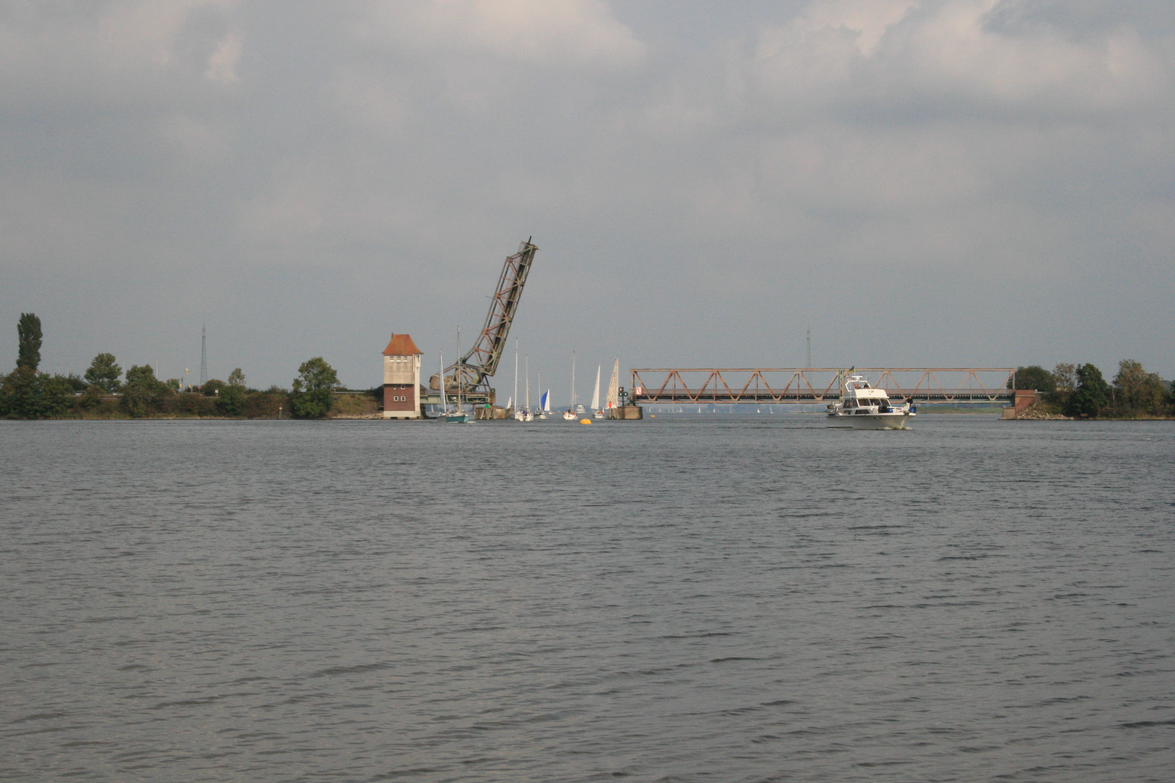 Eisenbahnbrücke über die Schlei in Schleswig-Holstein. Die Brücke gehört zum Gemeindegebiet von Rieseby, wird aber allgemein als Brücke von Lindaunis bezeichnet.